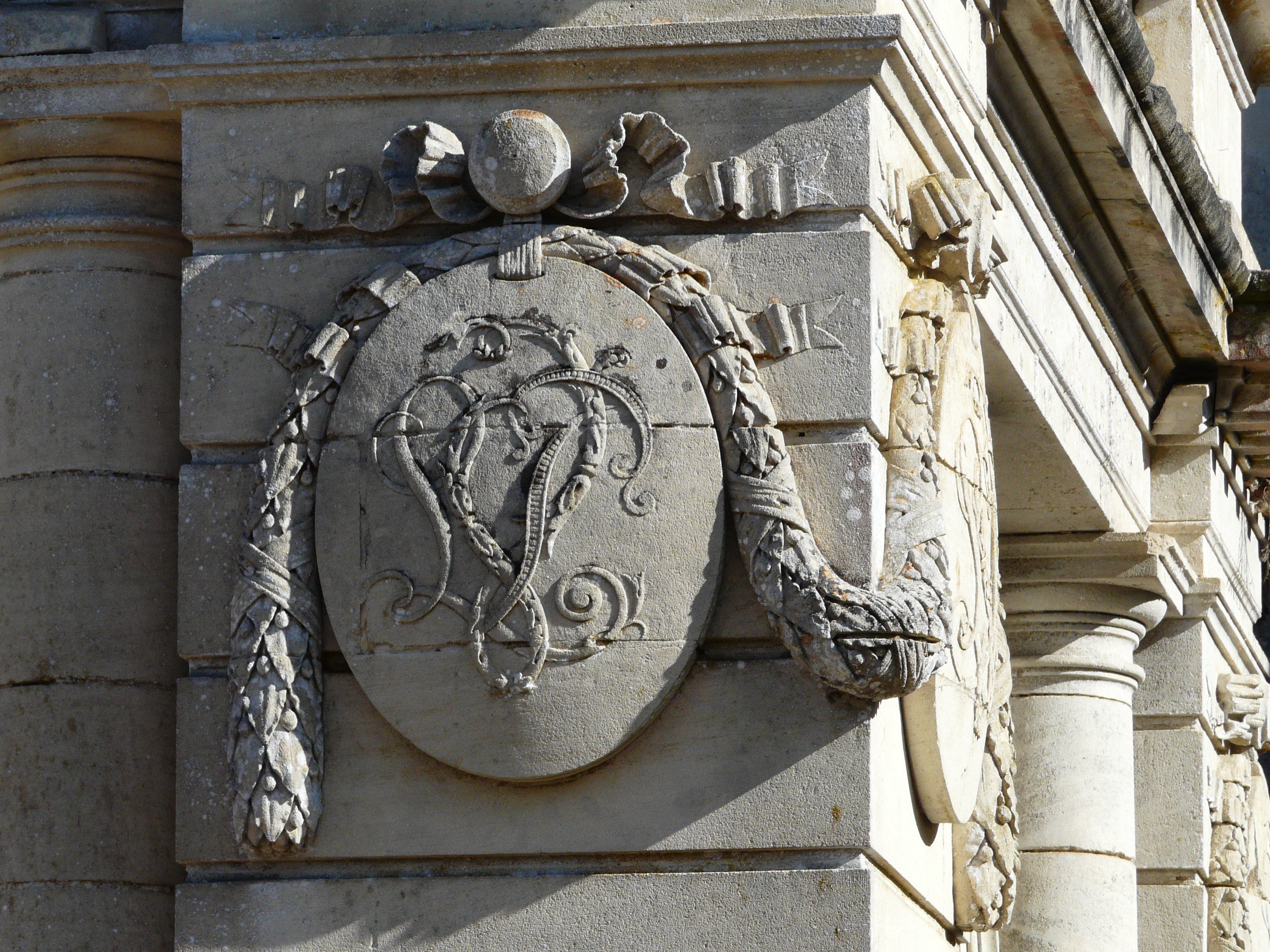 Lettres LP entrelacées représentant la famille de La Panouse, pavillon d'entrée du château de Tiregand, Creysse, Dordogne, France.